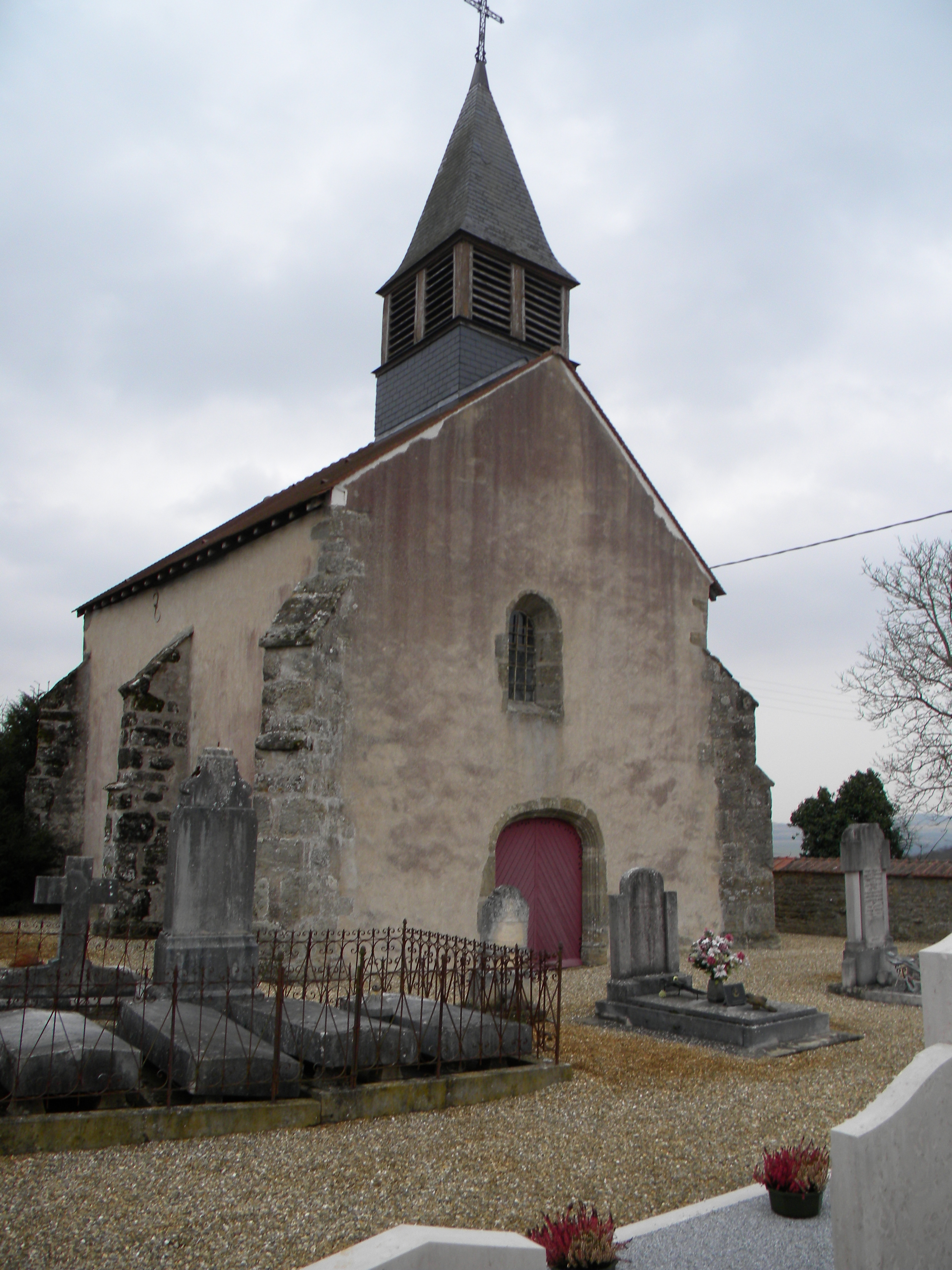 Épertully